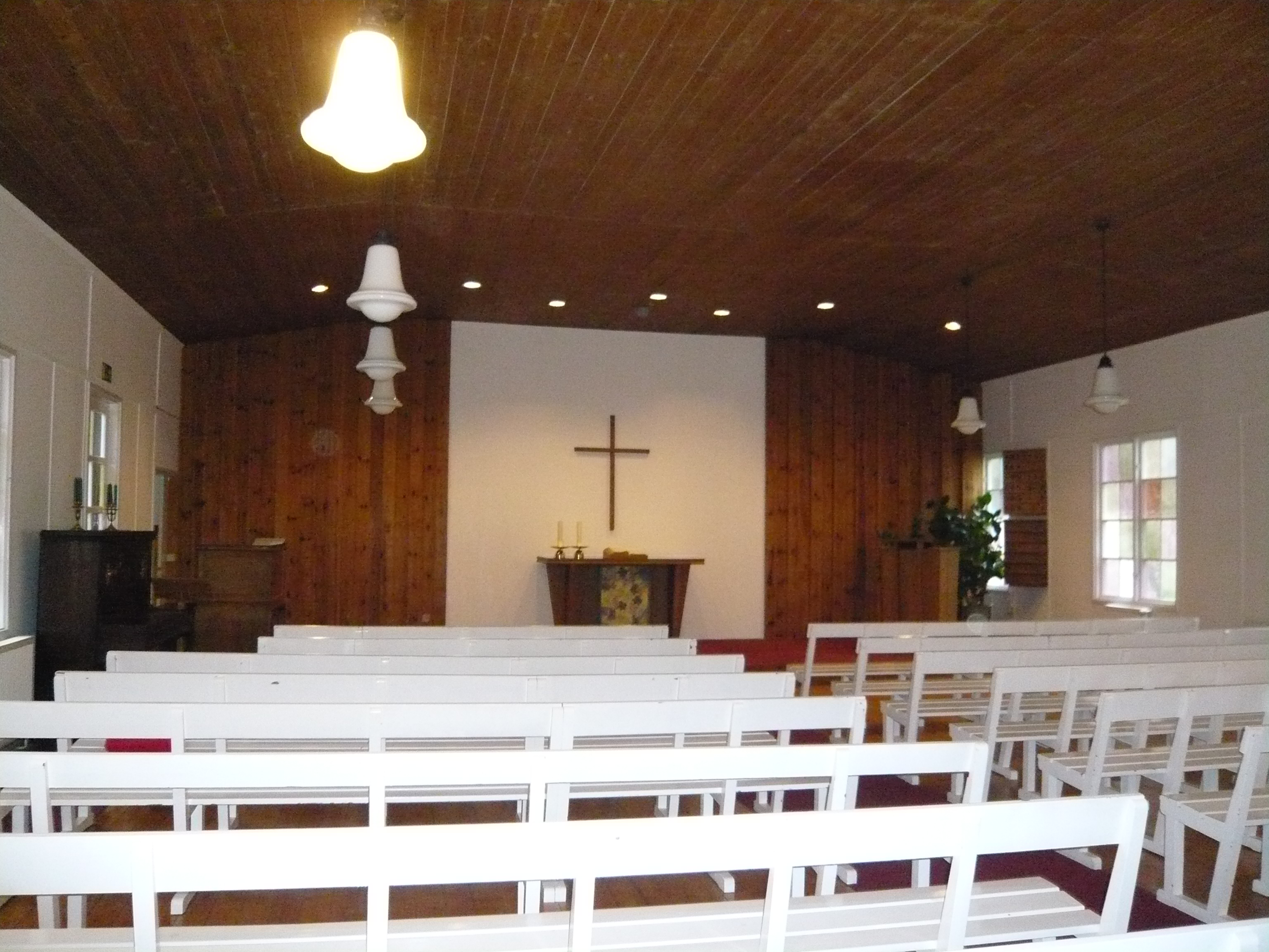 Christuskirche, Innenansicht (1)